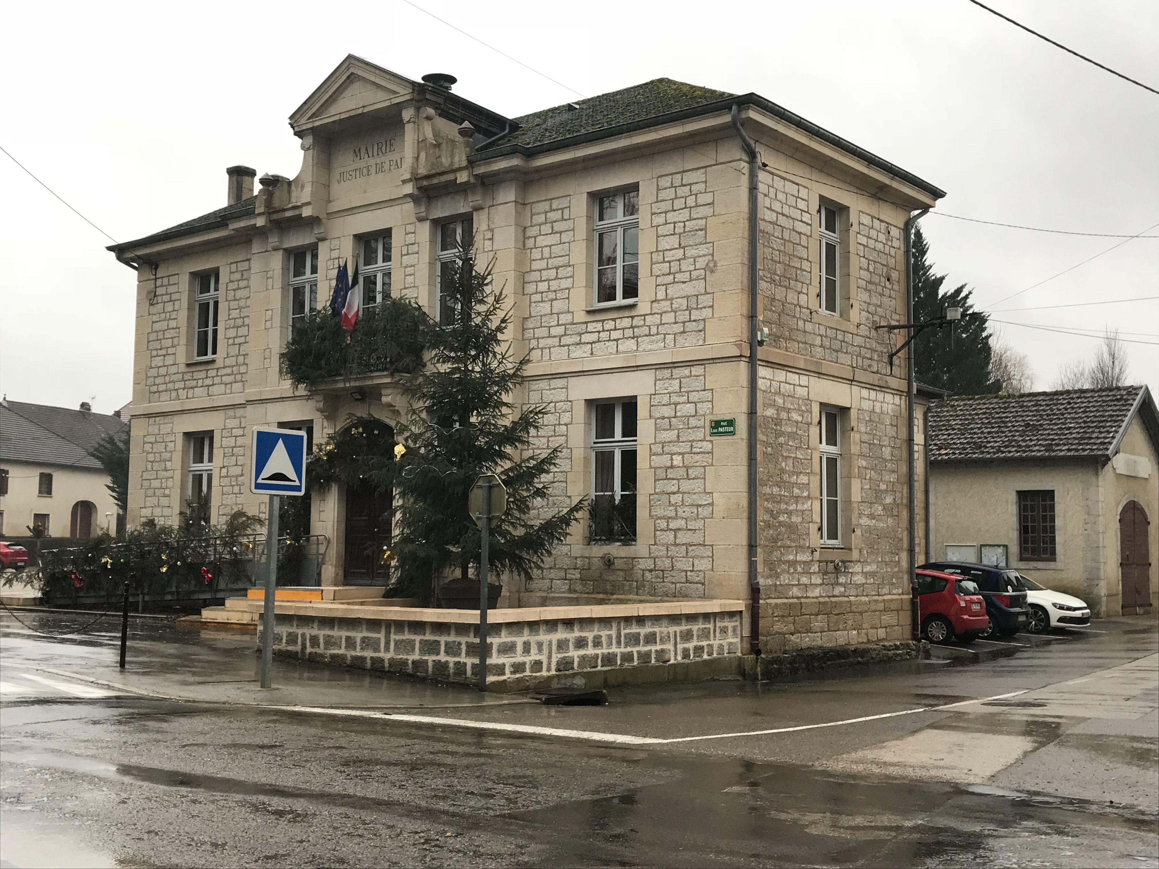 Villers-Farlay (Jura, France) en janvier 2018.